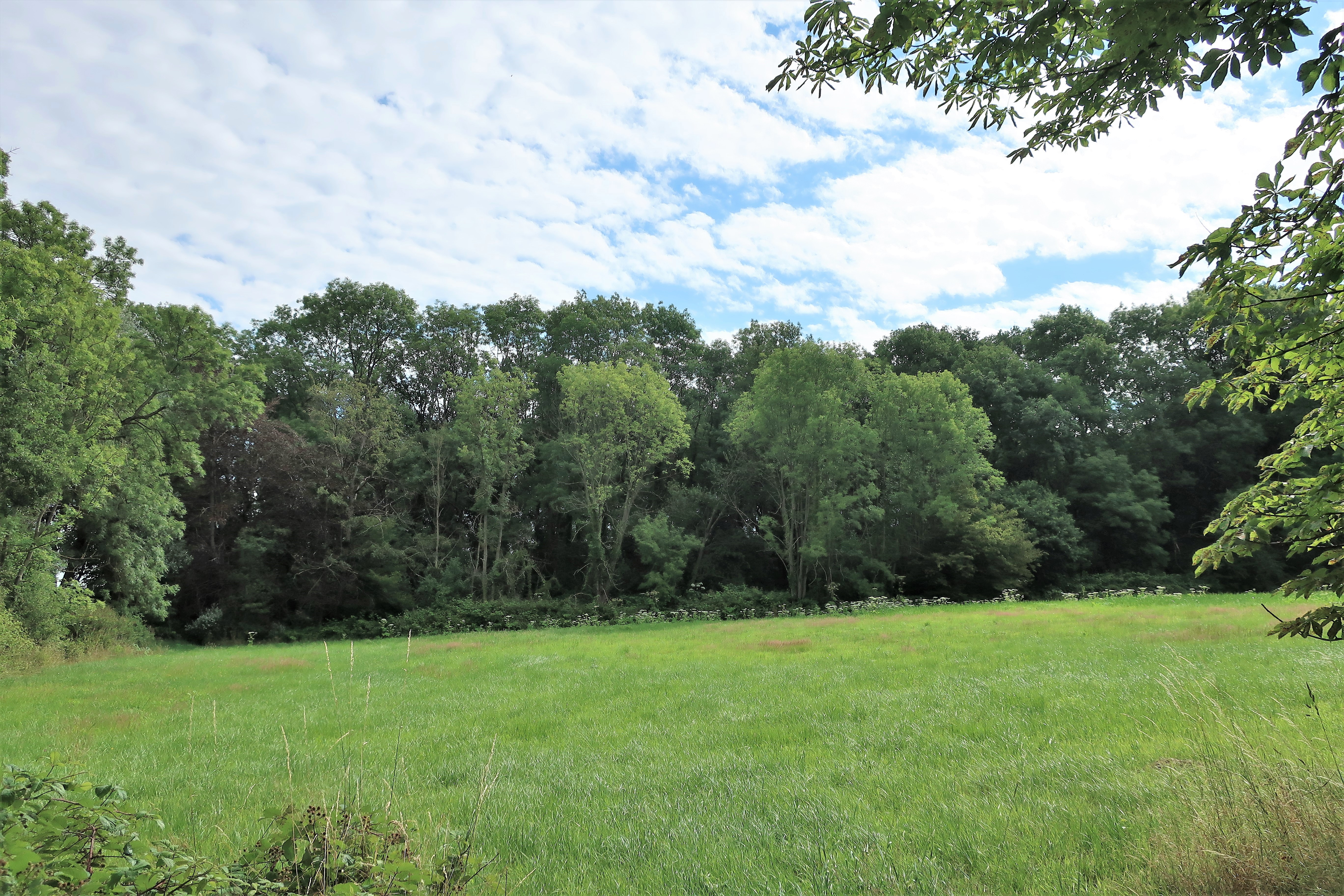 Geschützter Landschaftsbestandteil 1.4.2.19 „Wald und Teiche Gut Schönfeld“ in Hagen-Vorhalle, östlich von Gut Schönfeld. Es handelt sich um einen Laubwald mit einigen Kiefern, in dem 5 Teiche künstlich durch Bachaufstauungen angelegt wurden, sowie um eine Wiesenbrache.